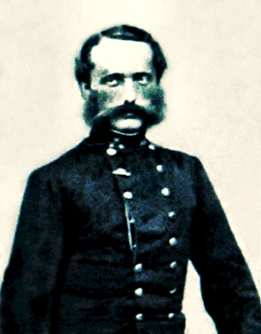 Der spätere Feldmarschalleutnant Rudolf Freiherr Lenk von Wolfsberg als Hauptmann um 1865, Ausschnitt von einem Familienfoto